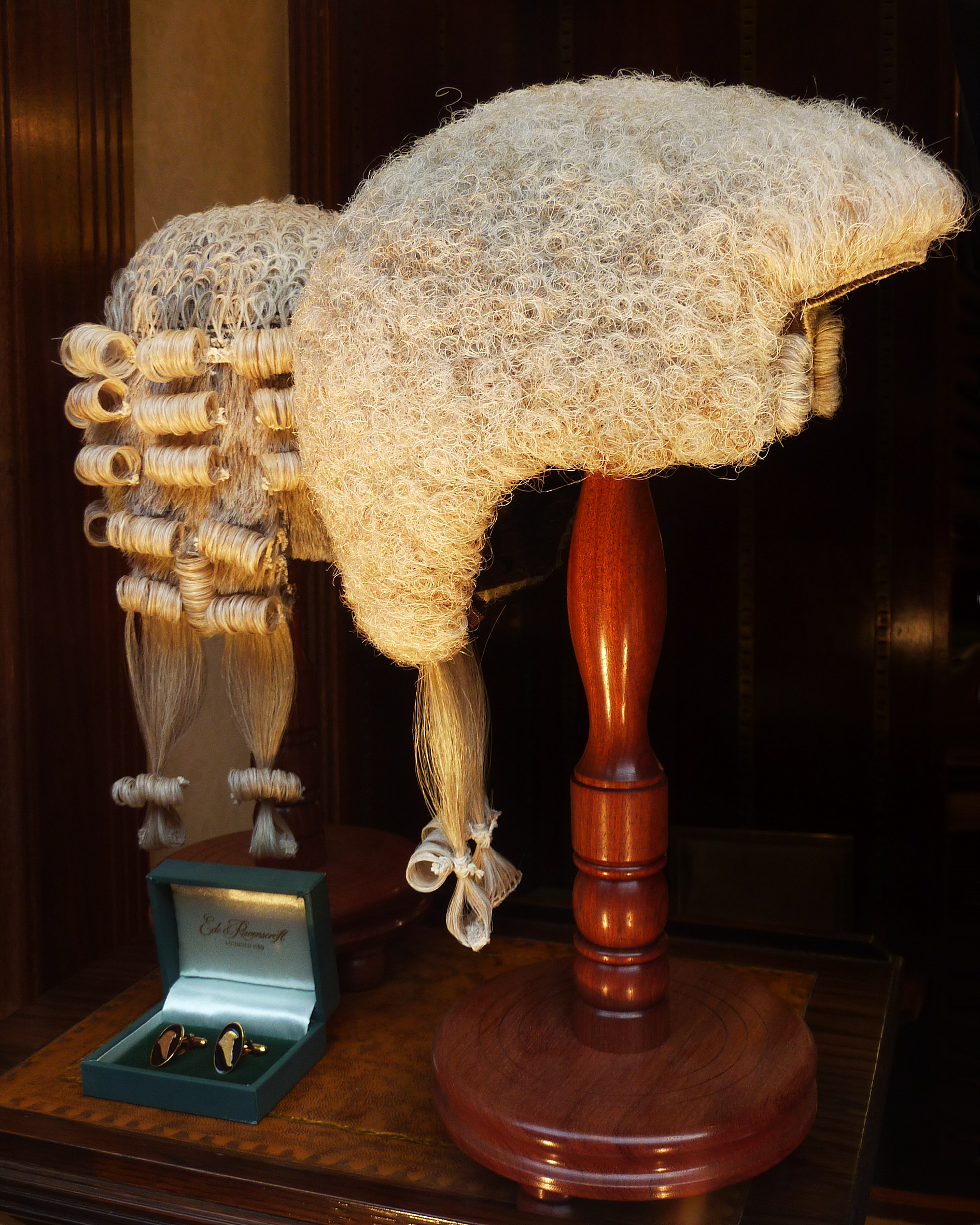 Perücken zu tragen bei Gericht. Gesehen bei Ede & Ravenscroft, legal wear tailoring and wig making, London, UK.